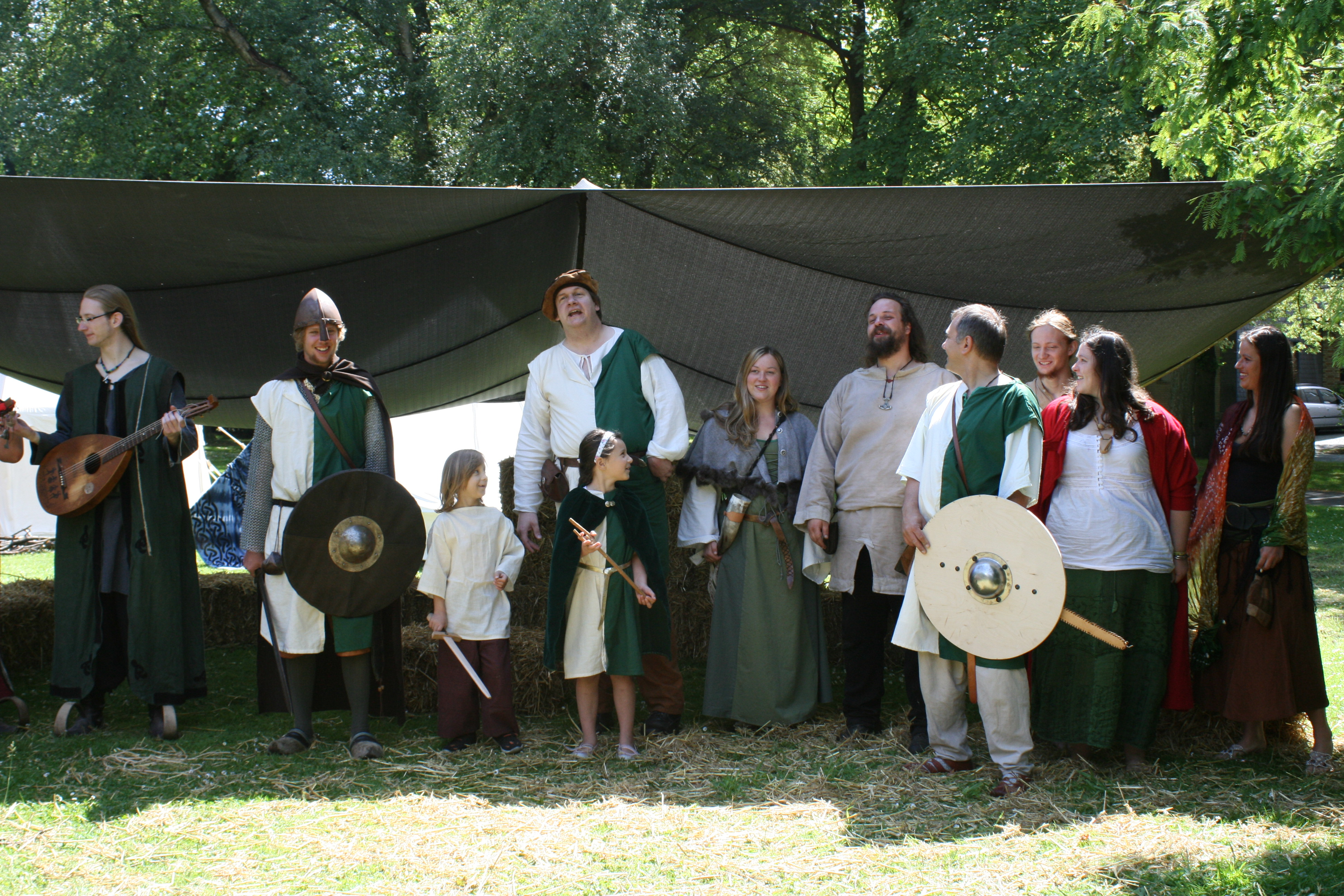 Eröffnung des Mittelalterfestes "Anno 1147" zu Datteln